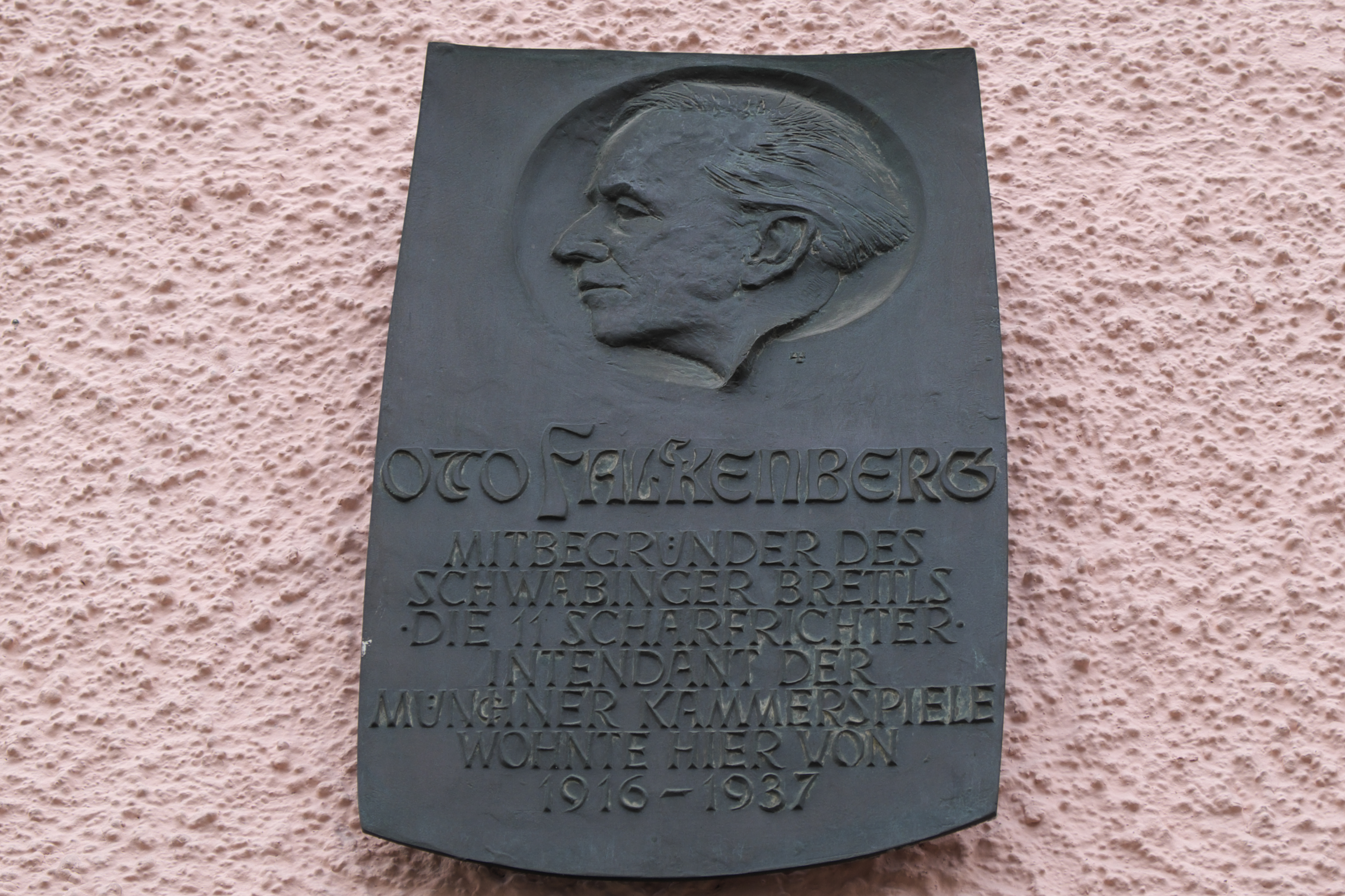 Gedenktafel für Otto Falckenberg, Viktoriastraße 11 in Schwabing (Stadtbezirk Schwabing-West) in München (Bayern/Deutschland)